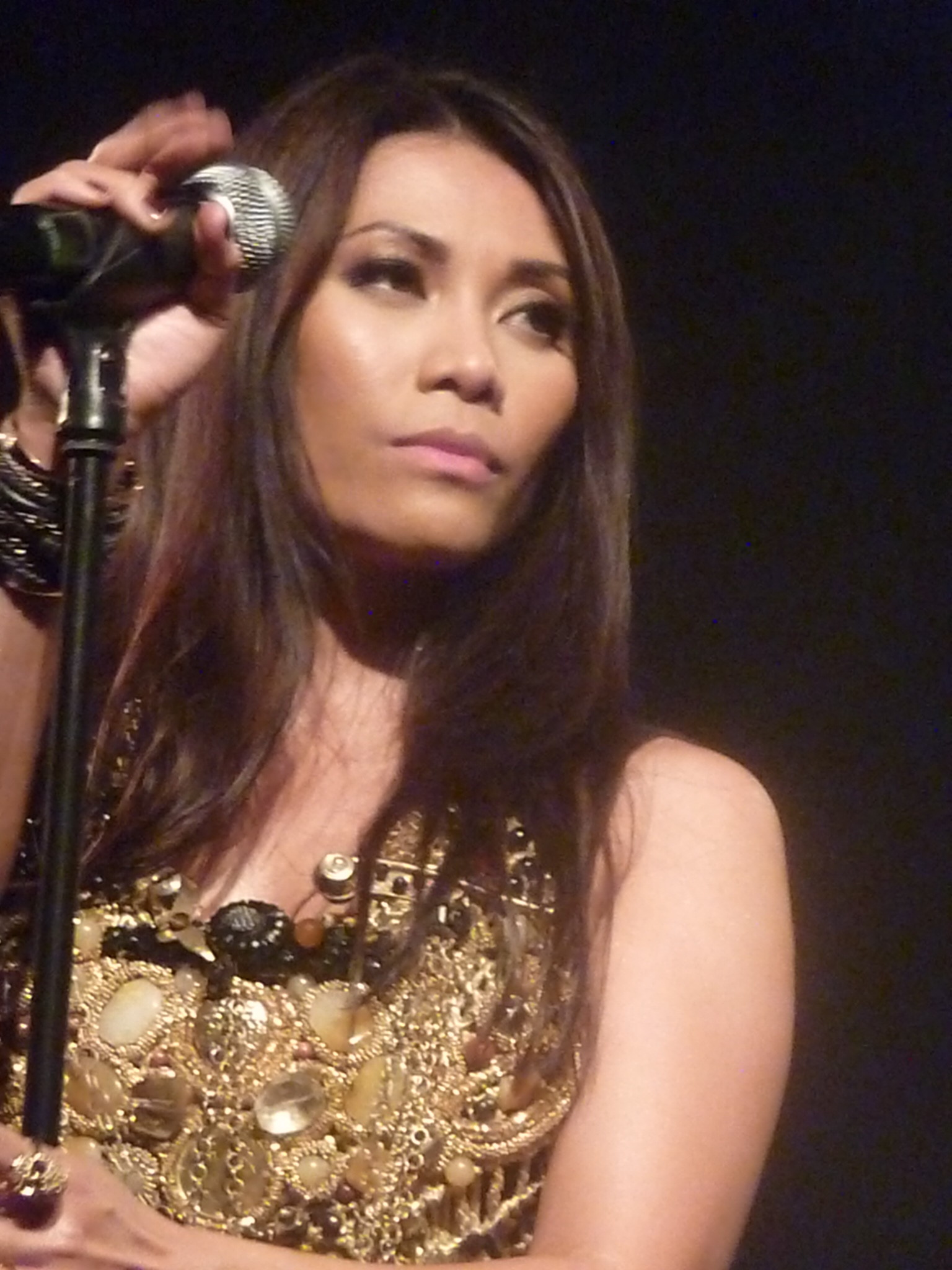 La chanteuse Anggun en concert au Trianon à paris en juin 2012